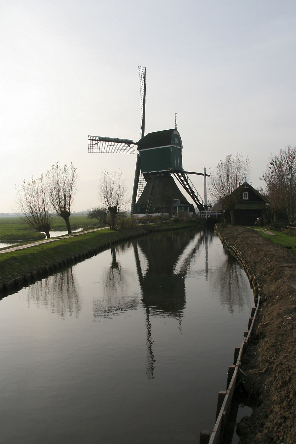 Vlist: molen De Bachtenaar